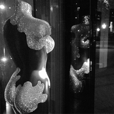 Sculpture Shine, Handmade out of 57.000 original Swarovski crystals.